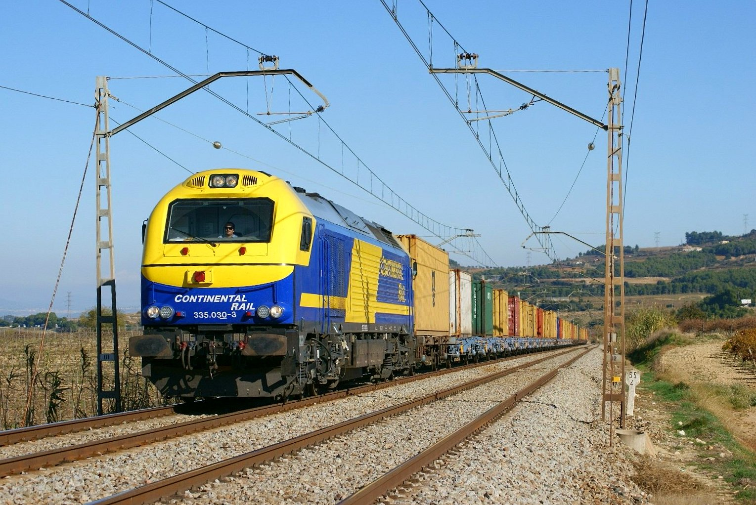 Un Teco de Continental Rail encapçalat per la 335.030 al seu pas per Lavern.